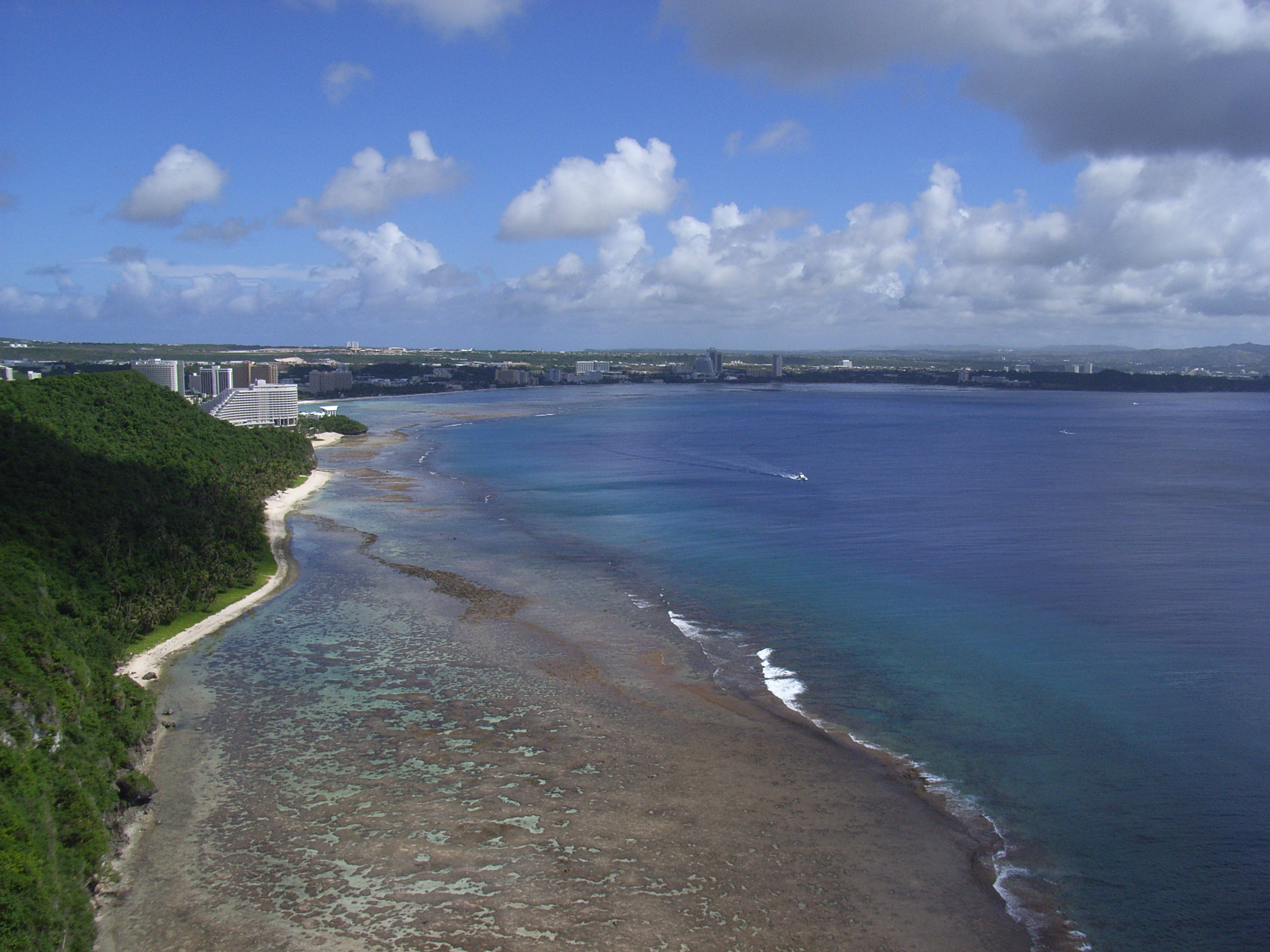 恋人岬からタモン湾を望む